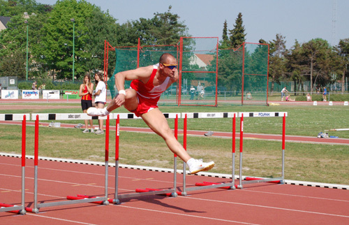 Sven Pieters op het PK 2007 te Kessel-Lo